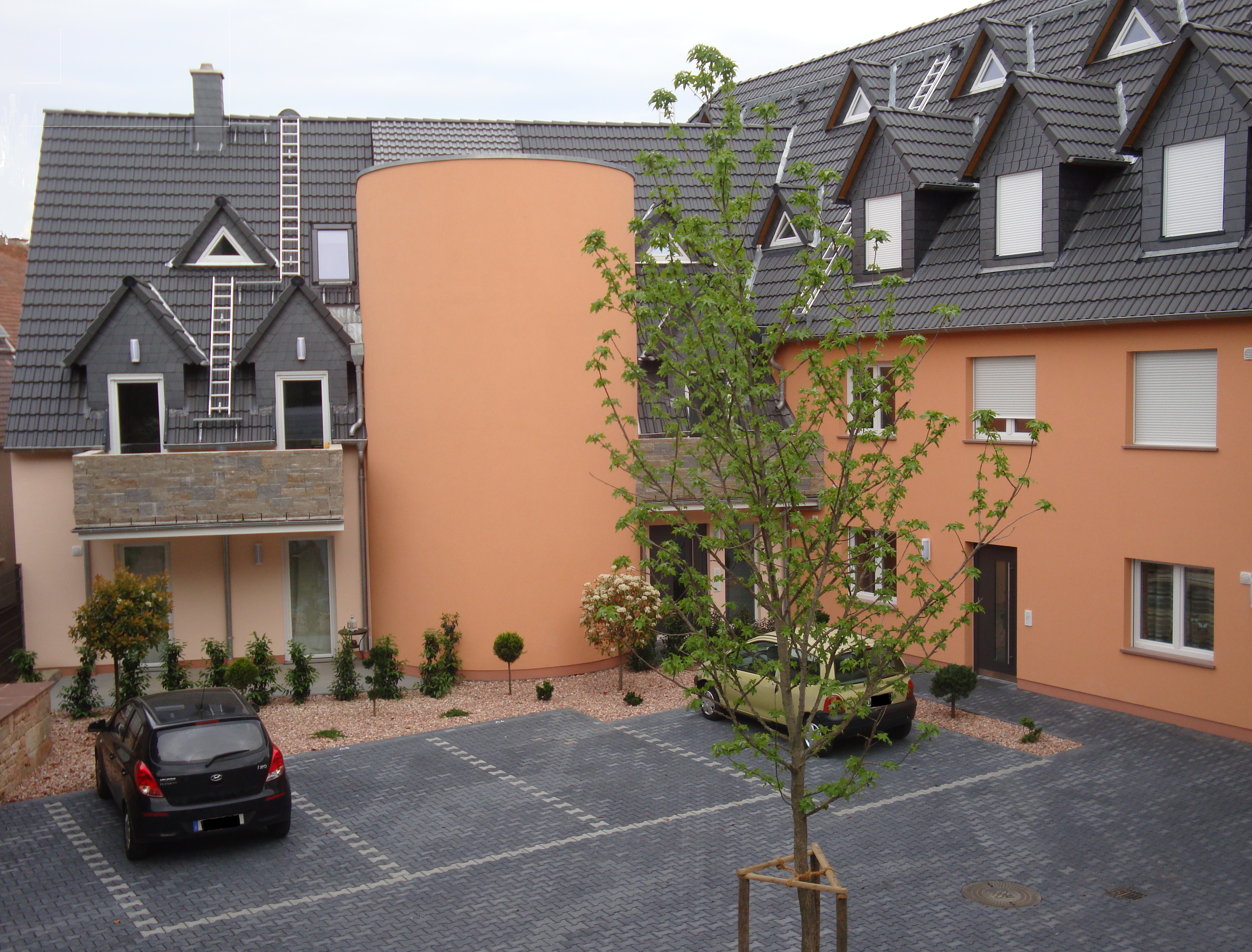 Solarhauskomplex bestehen aus 4 Neubauten und einem Altbau, 16 Wohneinheiten, Heizung mittels Solarthermie und Holz-Hackschnitzel, solarer Deckungsgrad von ca. 65 %, Speicherung mittels Solartank (66.900 Liter)